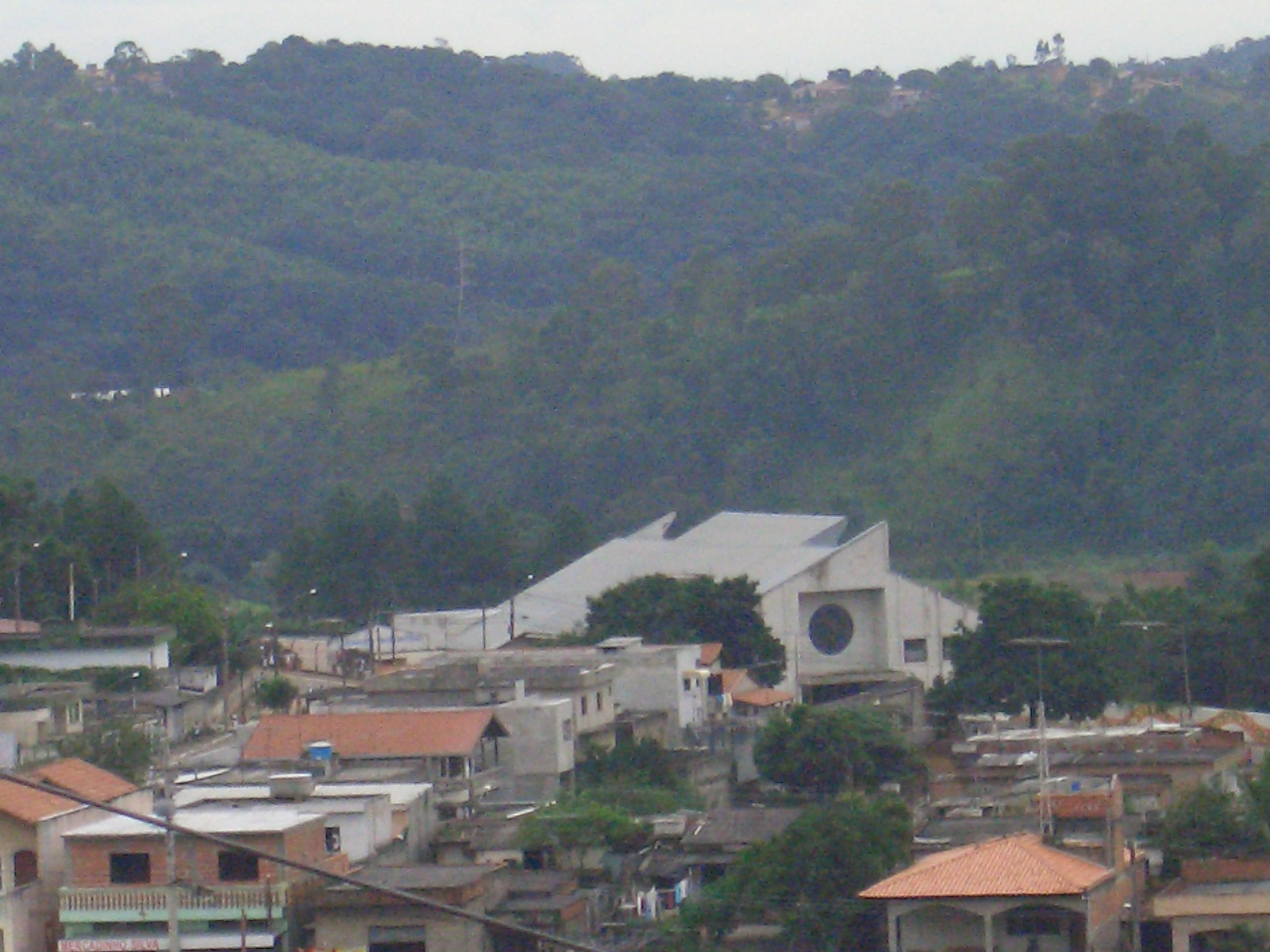 Igreja Católica do Jd. Promeca